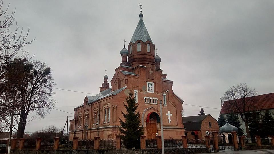 Свято-Воскресенський собор